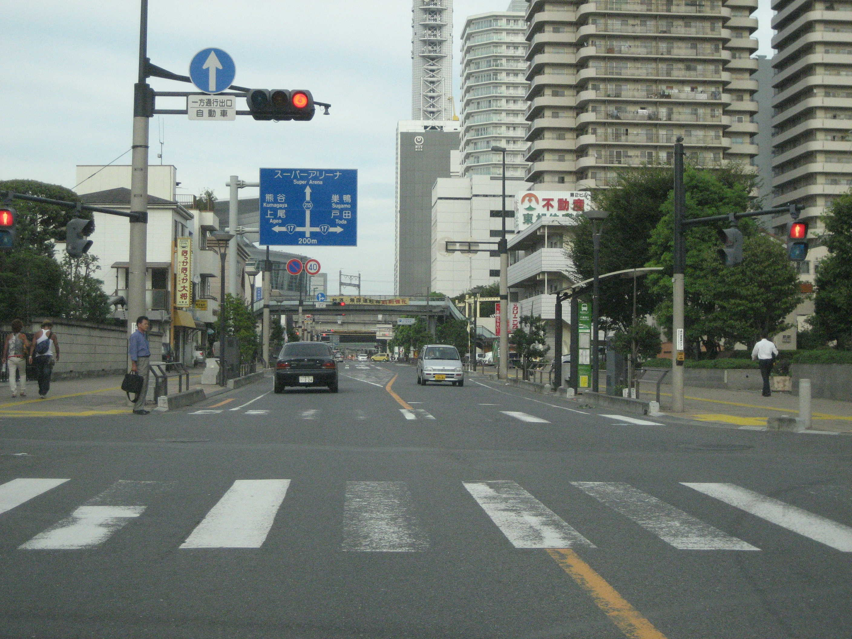 埼玉県道215号宗岡さいたま線、さいたま新都心方面（中央区）